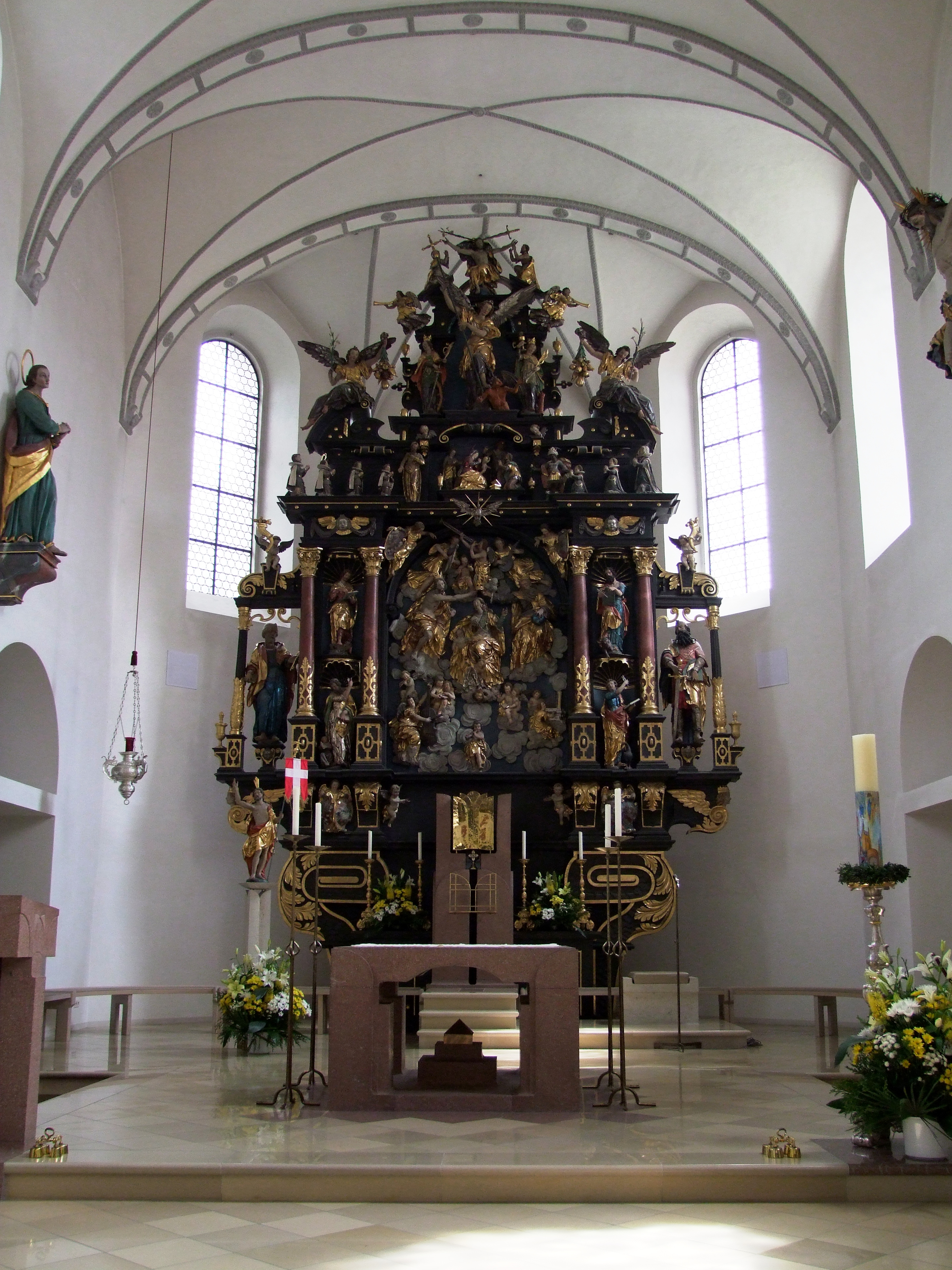 Hochaltar von St. Martin in Illertissen von Christoph Rodt.